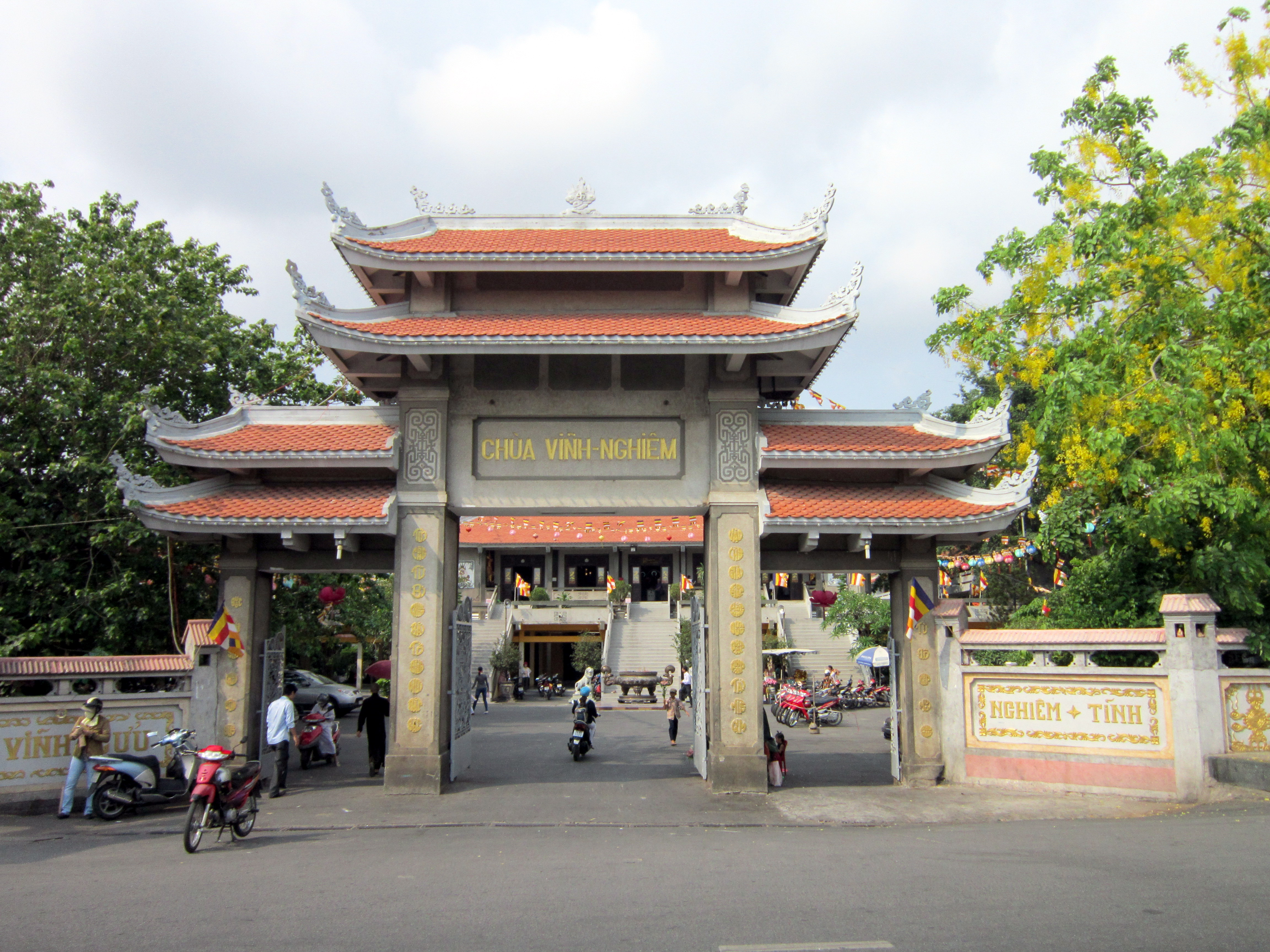 Chùa Vĩnh Nghiêm là một danh lam, hiện tọa lạc tại số 339 Nam Kỳ Khởi Nghĩa, thuộc phường 7, quận 3, Thành phố Hồ Chí Minh, Việt Nam.